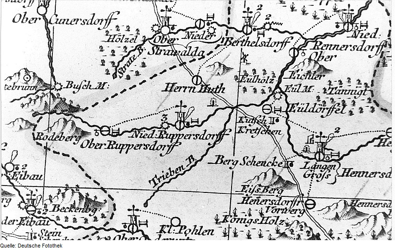 Original image description from the Deutsche FotothekHerrnhut-Ruppersdorf/O.L.. Oberlausitzkarte, Schenk, 1759